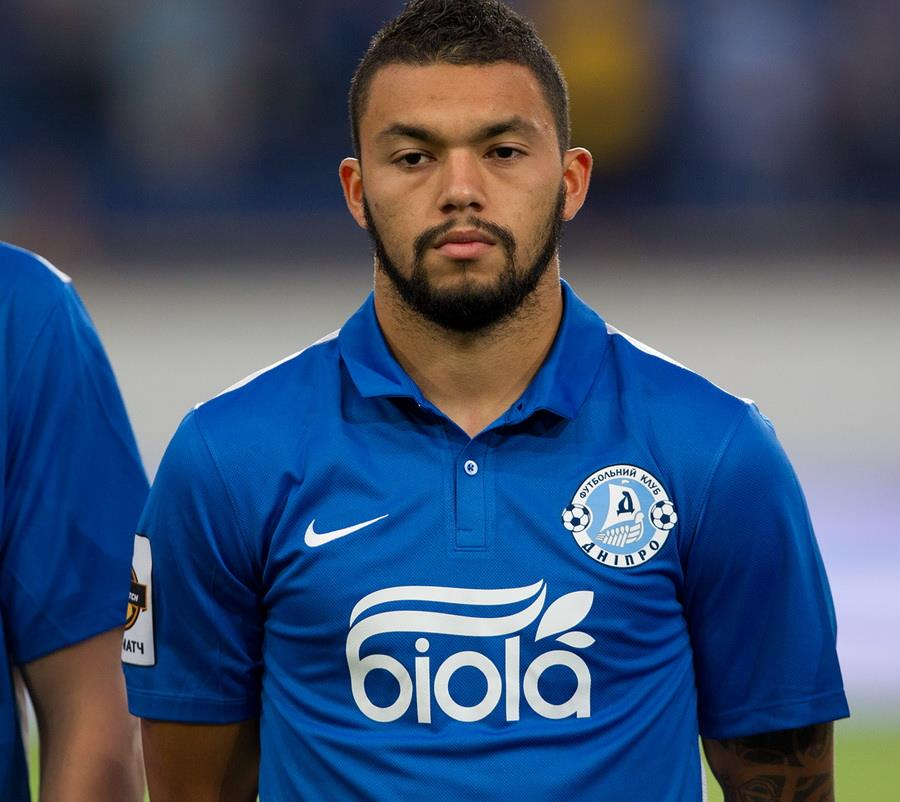 Джон Руїс у своєму першому матчі за Дніпро